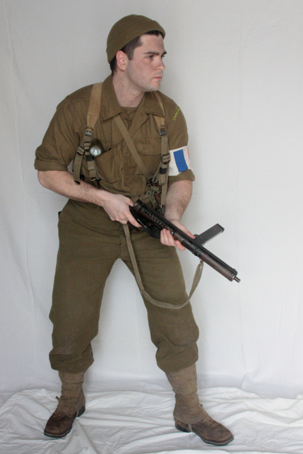 Tenue des chasseurs du bataillon de choc à l'été 1944. Reconstitution réalisée par le collectif du bataillon de choc.